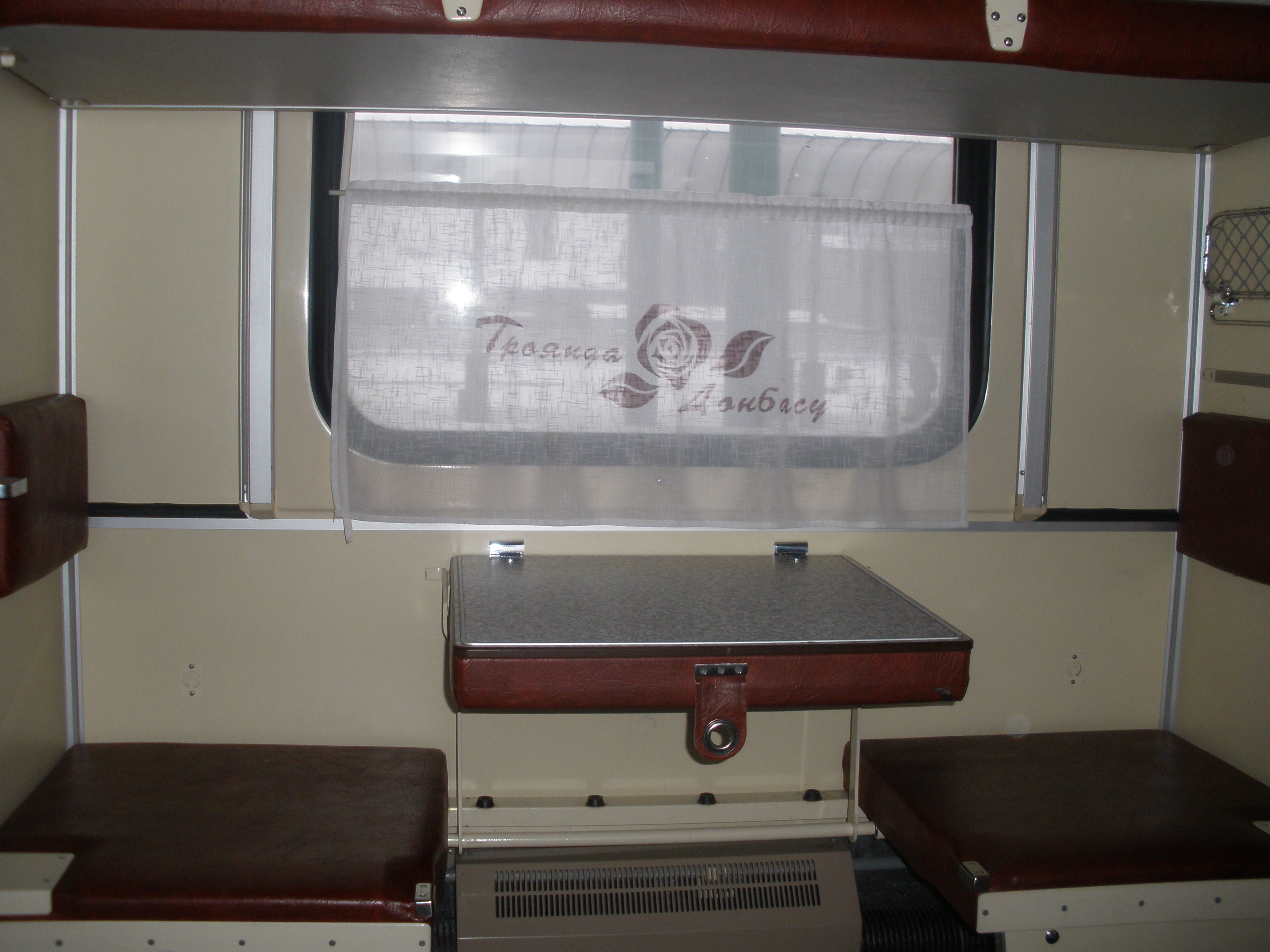 Боковая плацкарта. Поезд "Роза Донбасса"